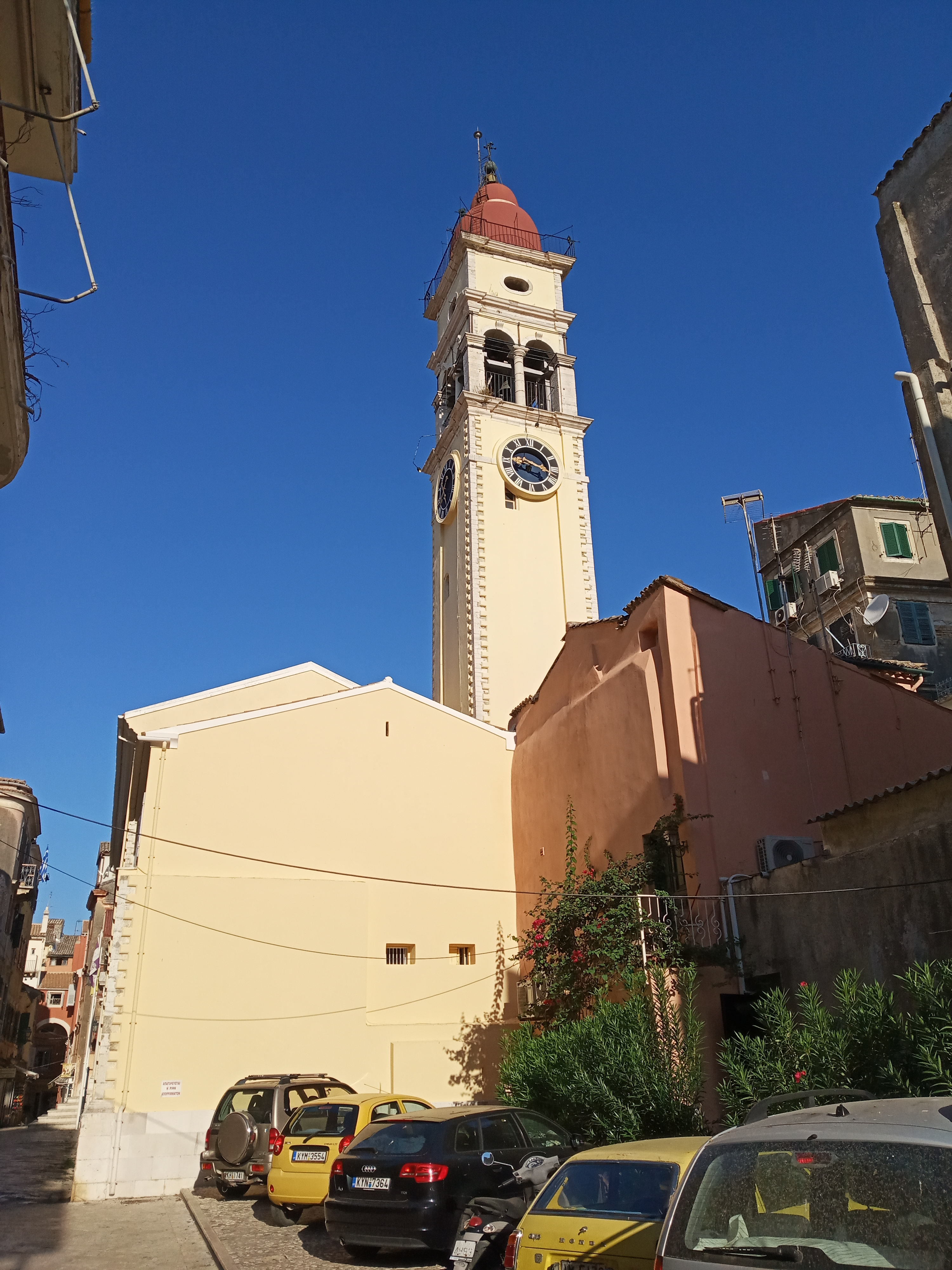 Корфу Храм Святого Спиридона